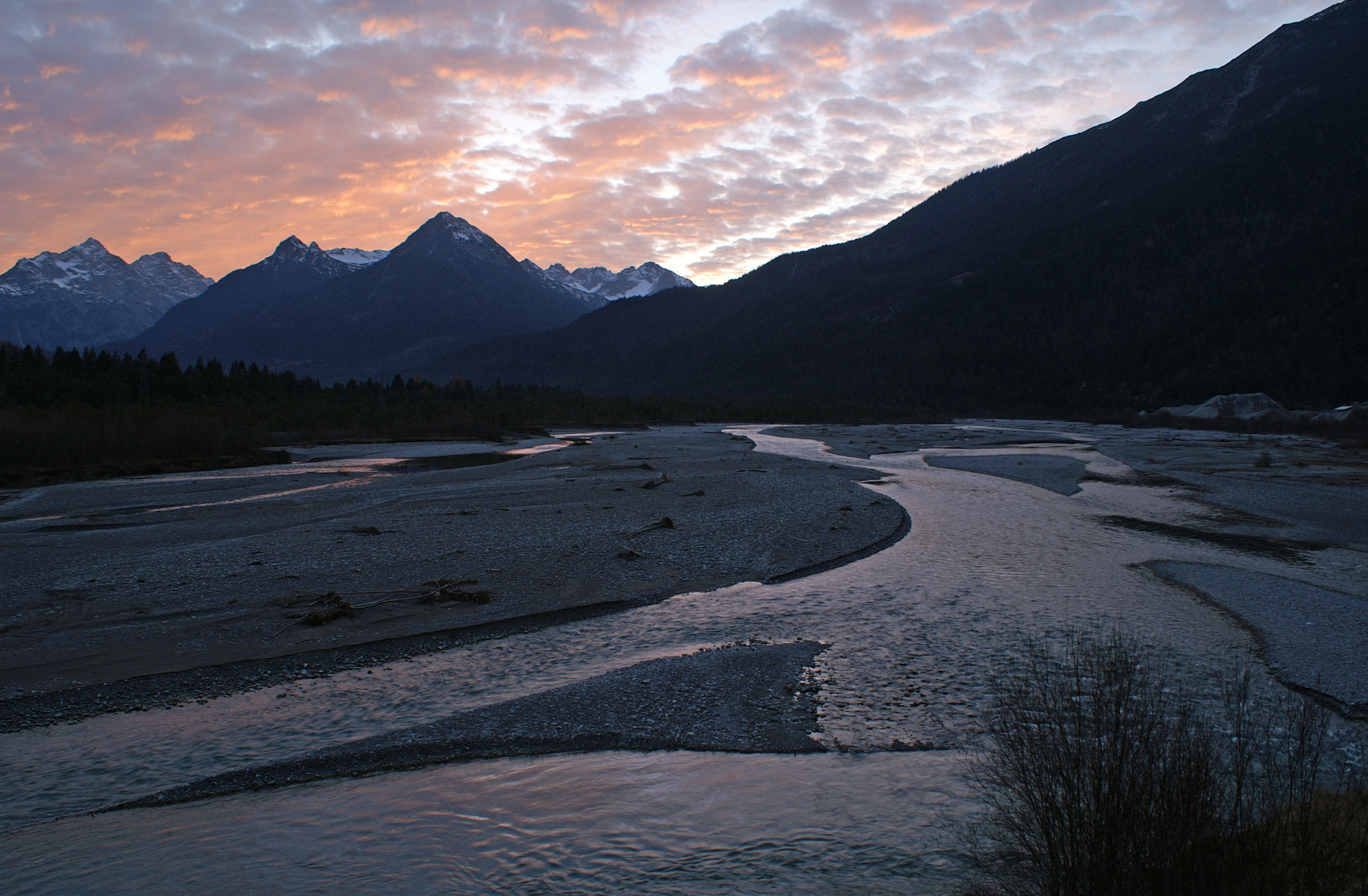 Der Lech bei Forchach, Blickrichtung Westsüdwest auf die Hornbachkette der Allgäuer Alpen. Im Hintergrund Klimmspitze (2464 m), Schwellenspitze (2496 m), Grubachspitze (2100 m), Saldeiner Spitze (2036 m) sowie Großer und Kleiner Rosszahn (2356 und 2312 m)